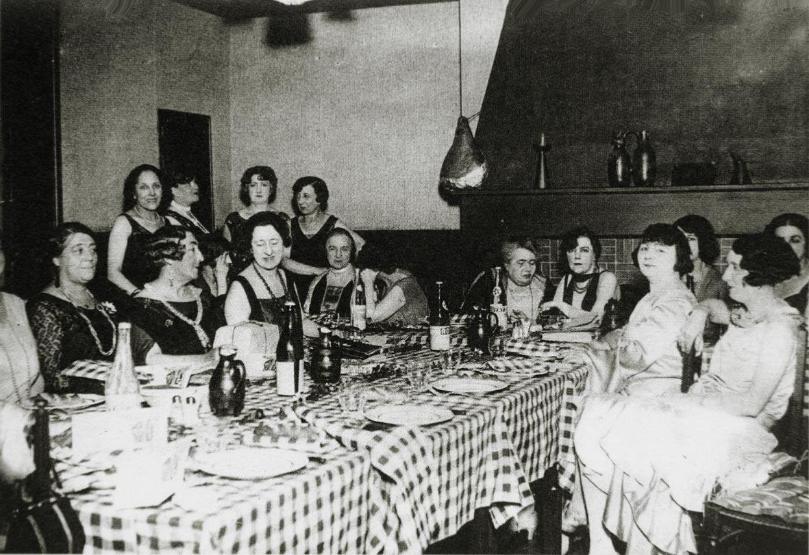 archives Curnonsky publiée par Jeanne B Barondeau Curnonska 2007 t3